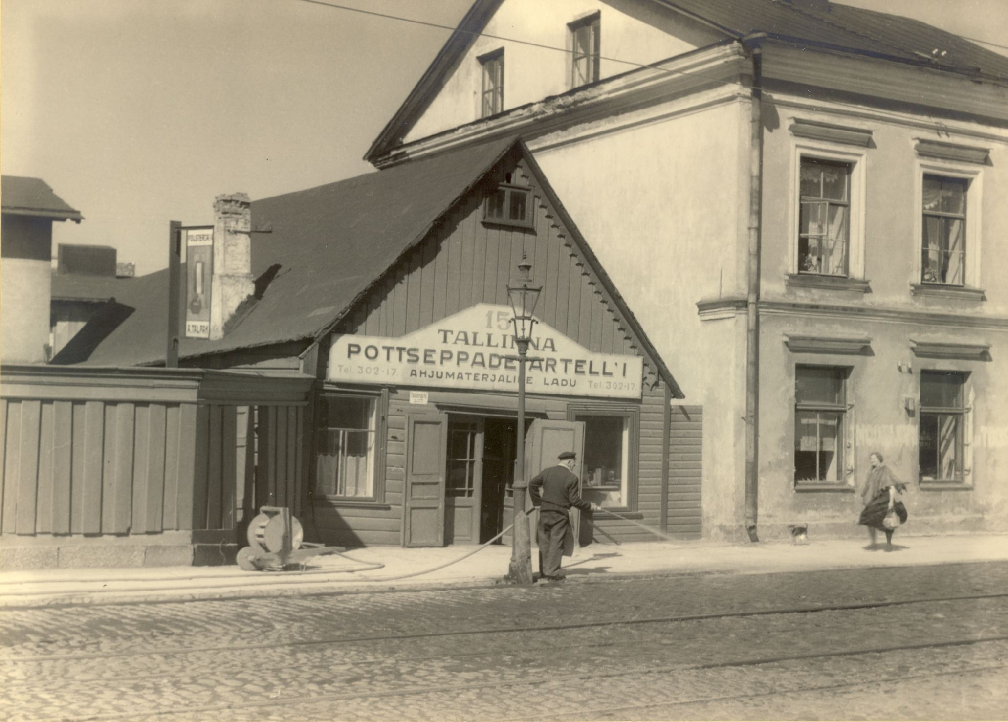 Narva mnt 15